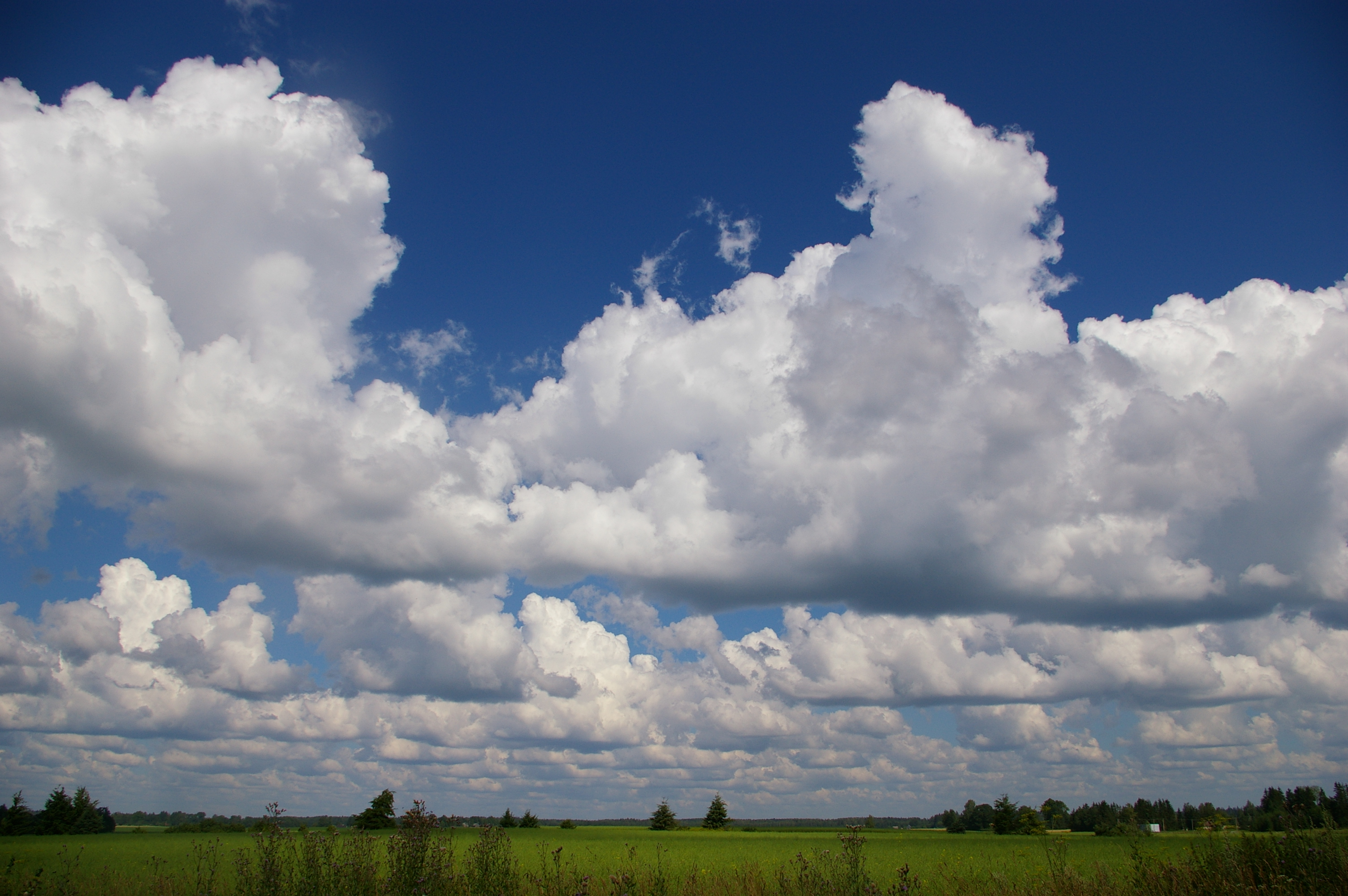 Jäädvustatud Jõgeva linnas 22.07.2014. Cumulus humilis and medocris